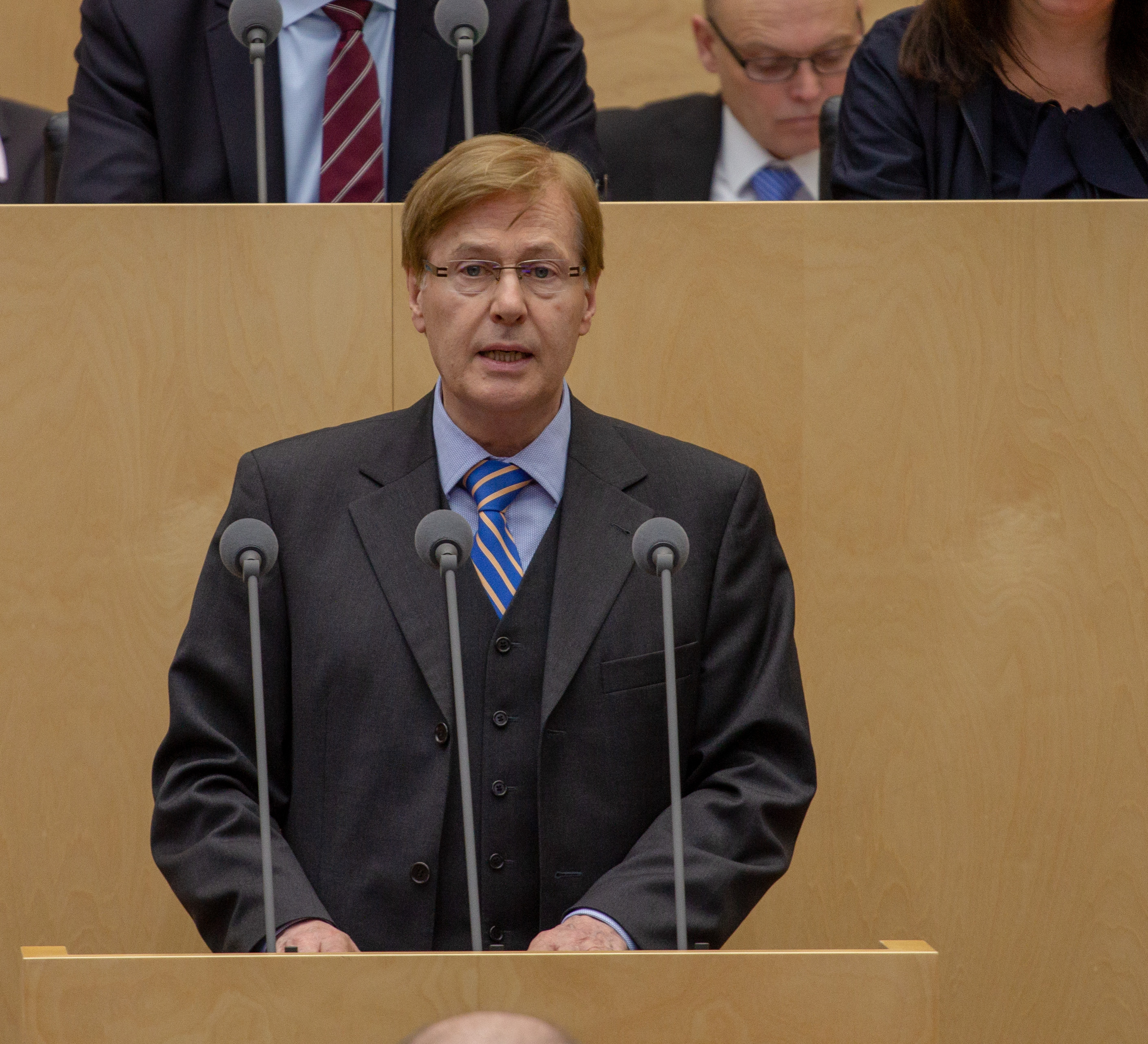 Plenarsitzung des Bundesrates am 12. April 2019 in Berlin.